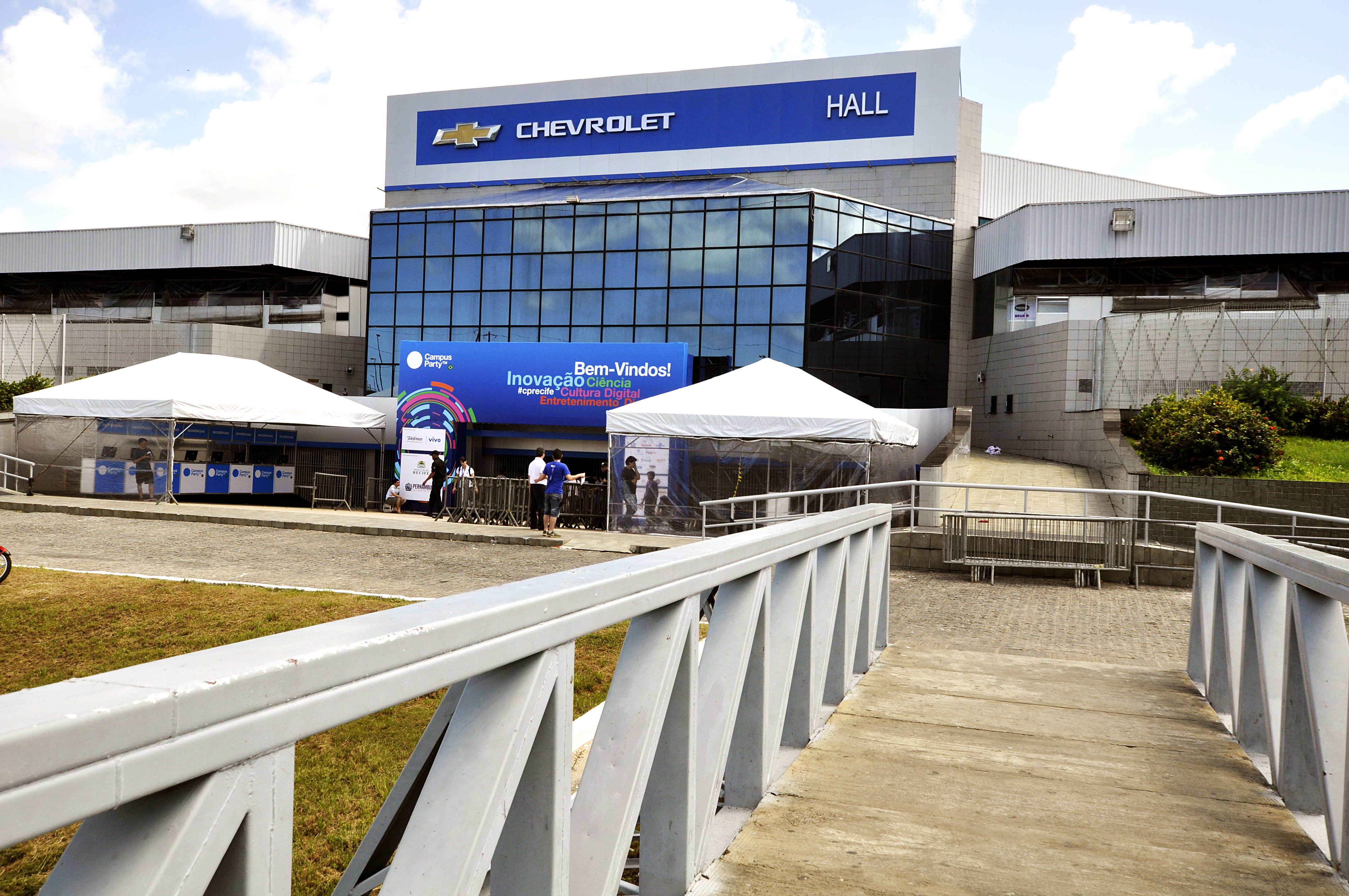 Chevrolet Hall - Olinda, Pernambuco, Brasil